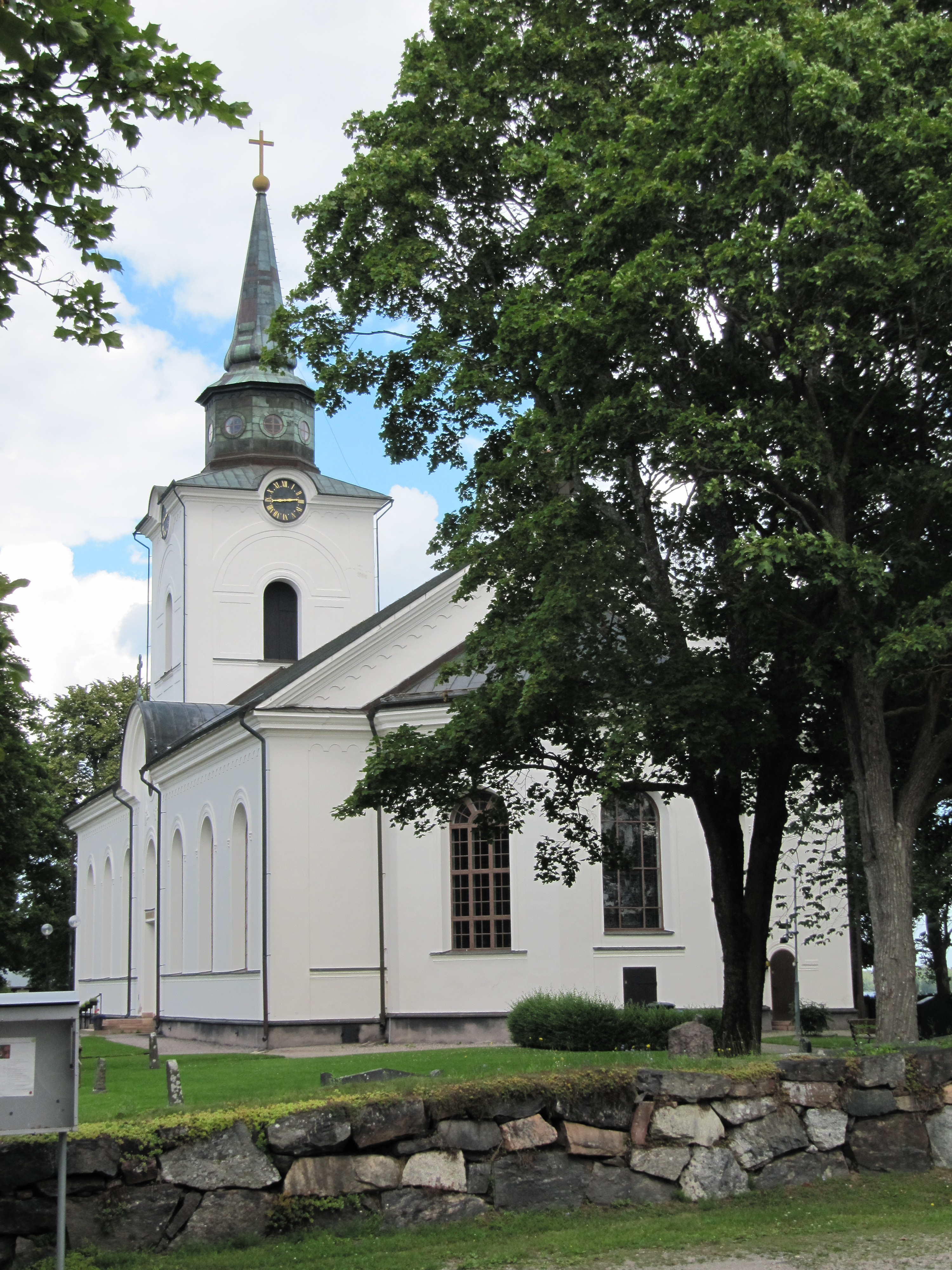 Hille kyrka